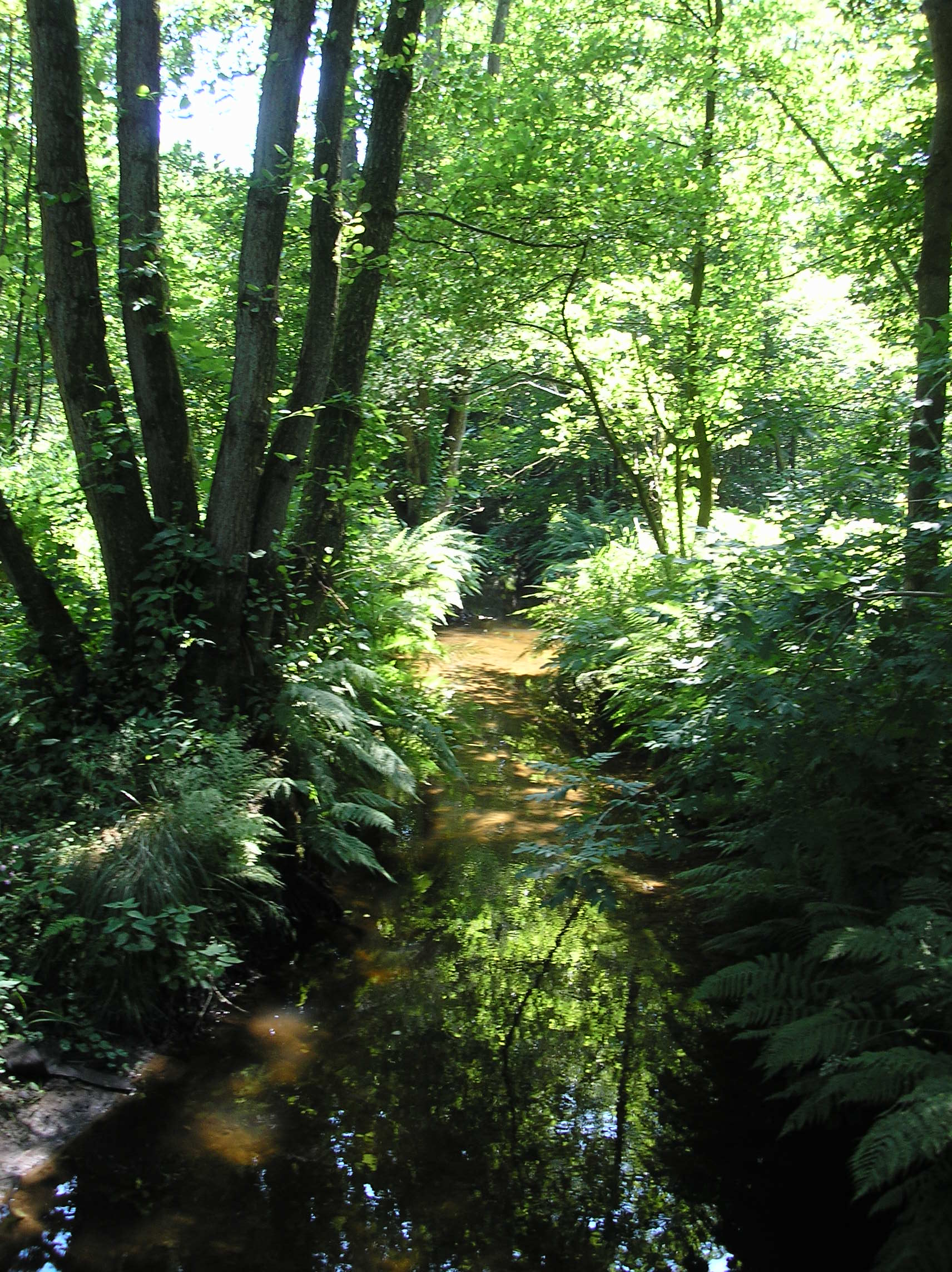 Foto van het Leuvenumse Bos. Foto is gemaakt door Anoniem. Ik heb de foto zelf gemaakt. De foto is vrijgegeven onder GFDL, maker van de foto is dus Anoniem.